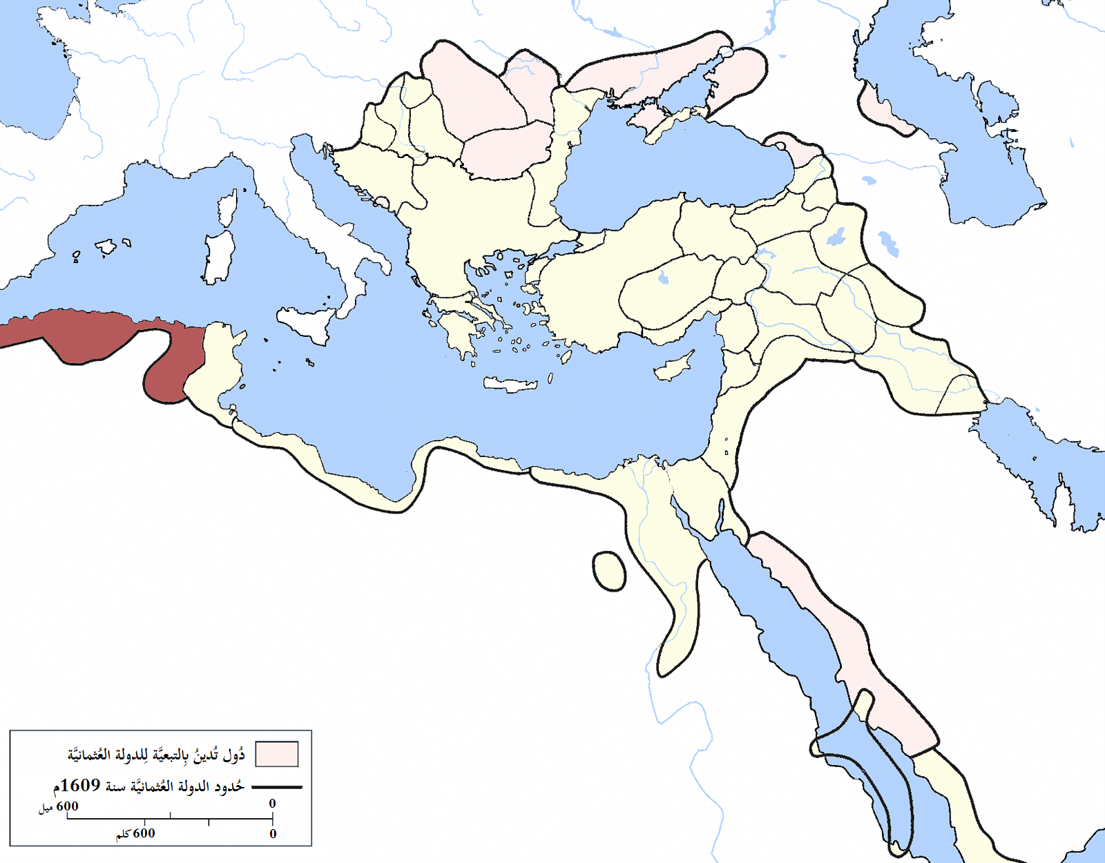 خريطة إيالة الجزائر بِالدولة العُثمانيَّة سنة 1609م.